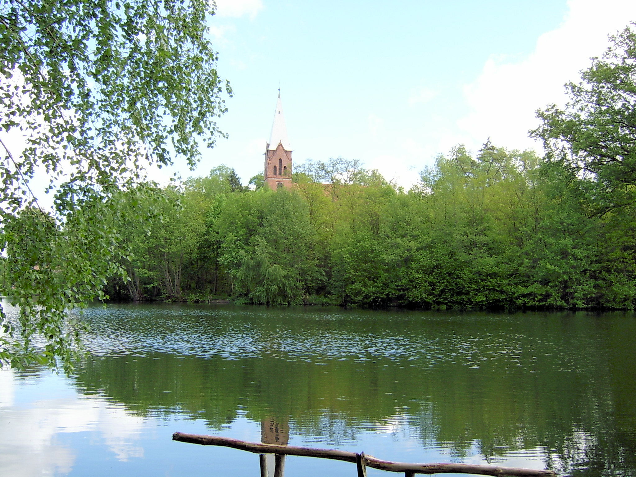 Goszczanowo, Poland